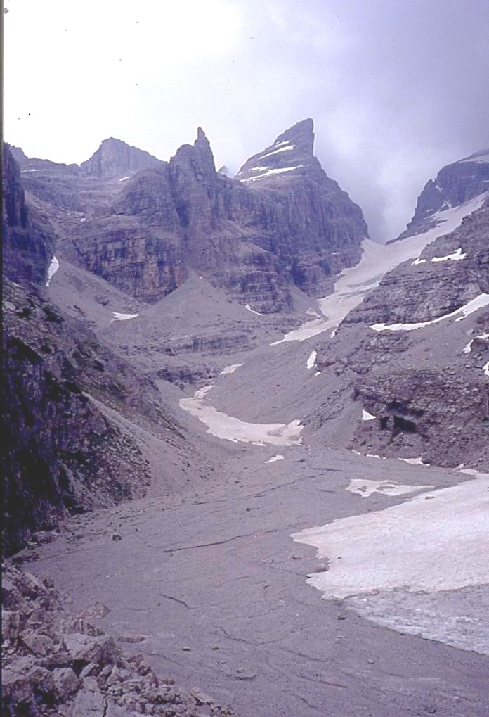 La Bocca del Tuckett vista dal rifugio Tuckett